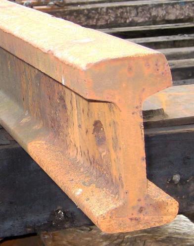 Rail double champignon photographié en Irlande sur le réseau Irish Rail